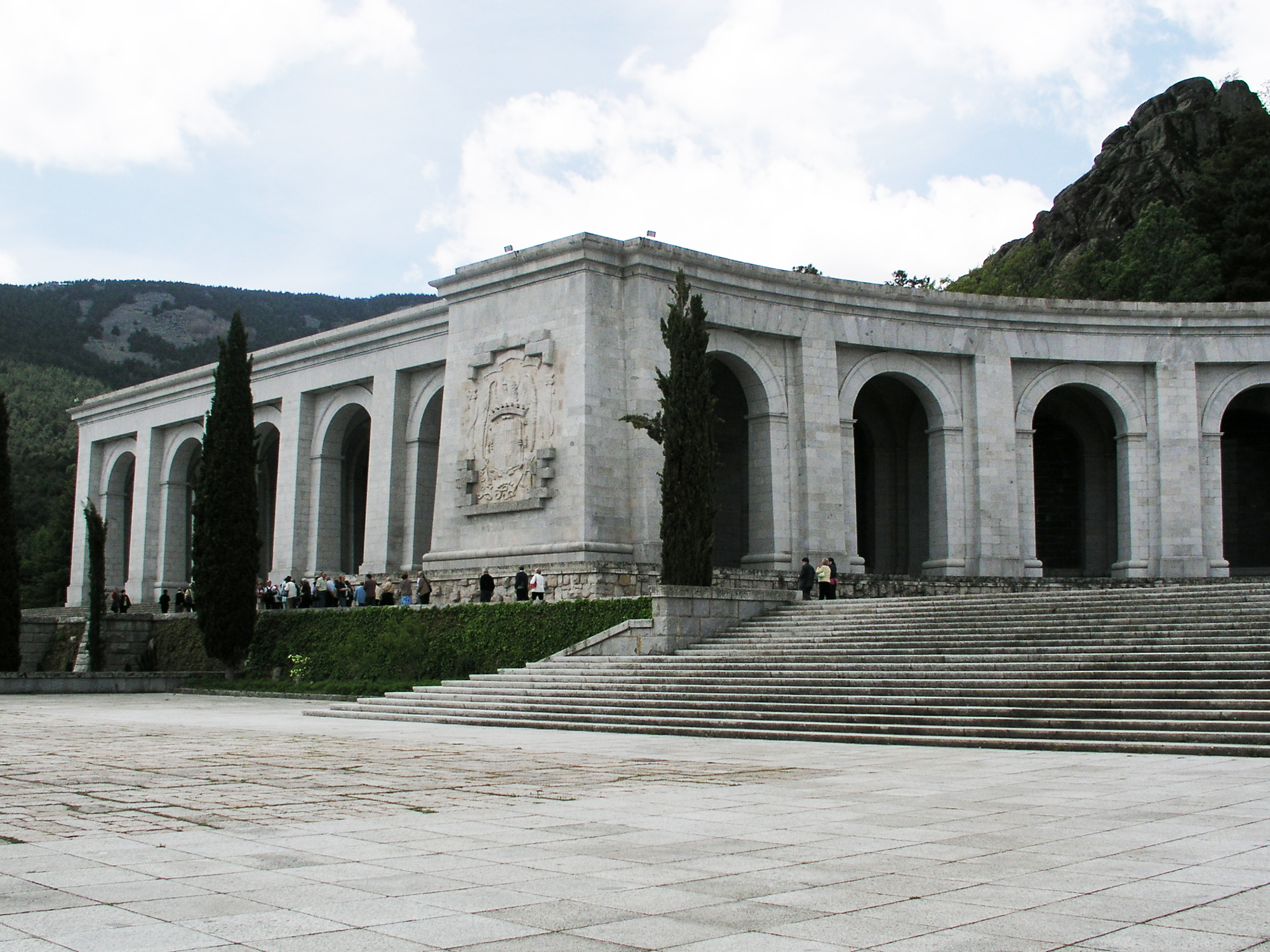 Valle de Los Caidos, Madrid, Spain. Left wing.